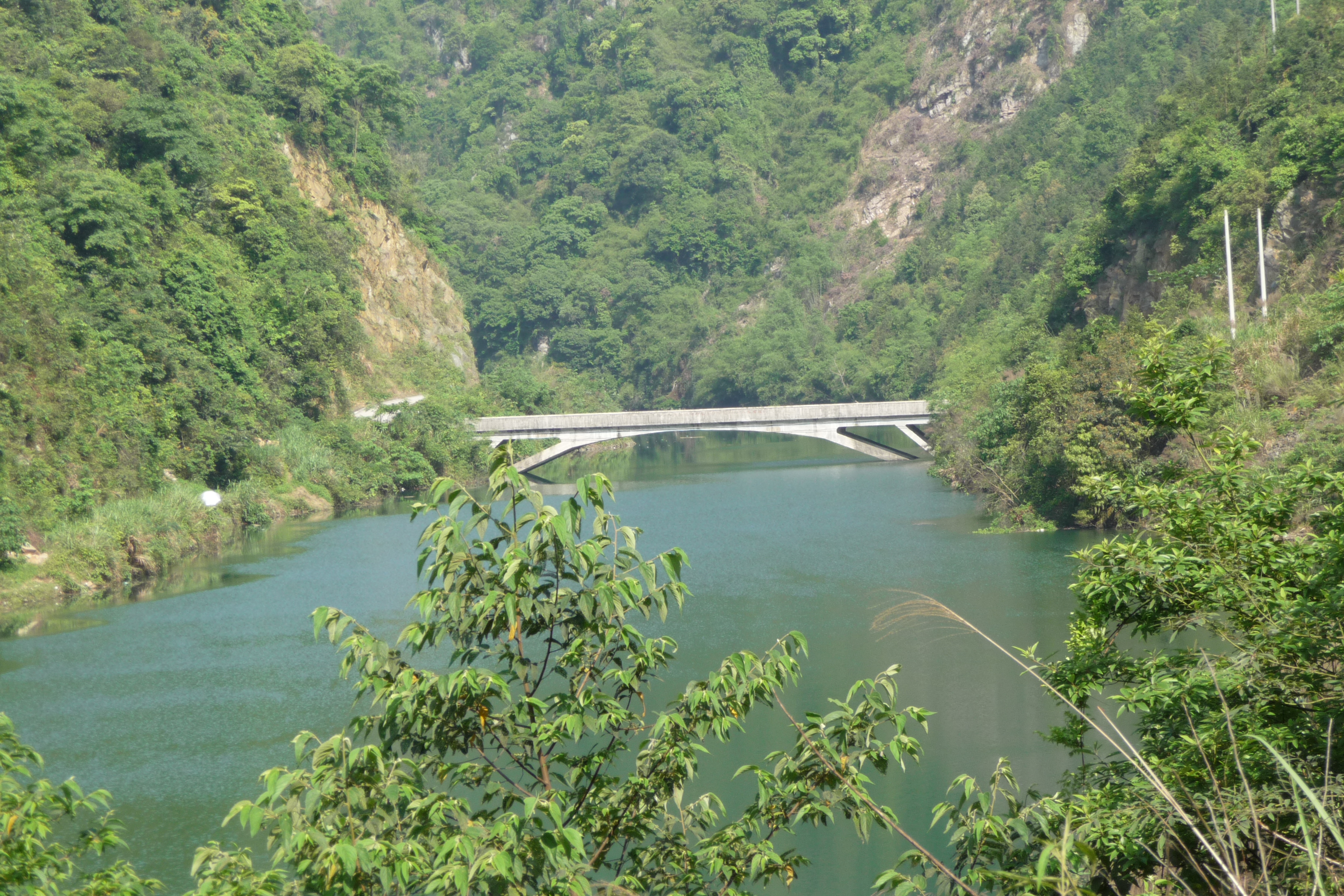 必背瑶乡山谷之桥